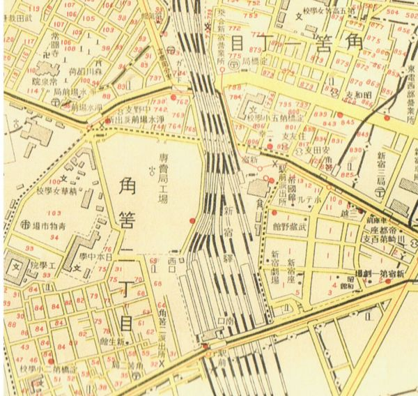 東京府東京市淀橋区大字角筈町1丁目（現在の東京都新宿区新宿3丁目）付近の地図、1937年